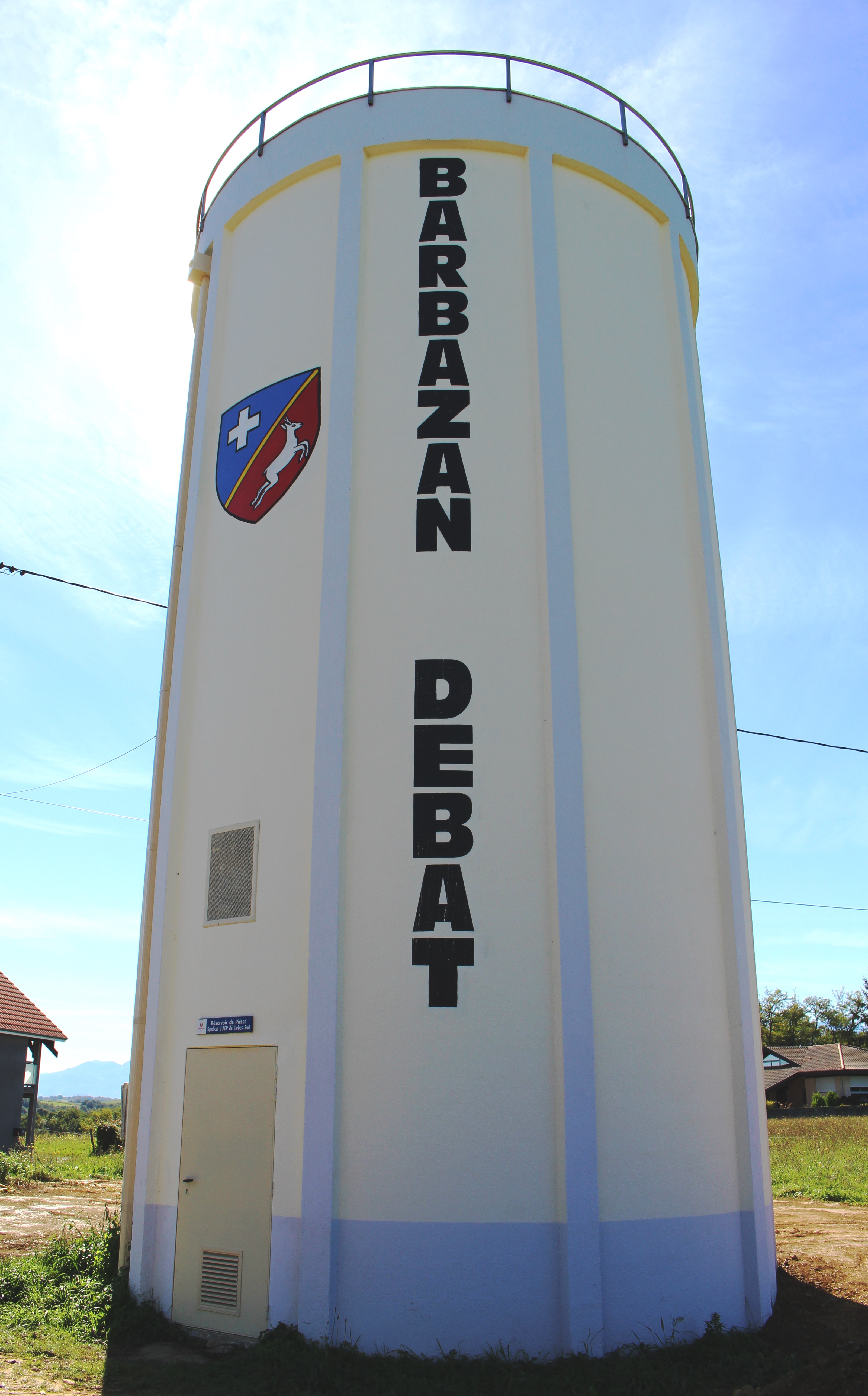 Château d'eau de Barbazan-Debat (Hautes-Pyrénées)